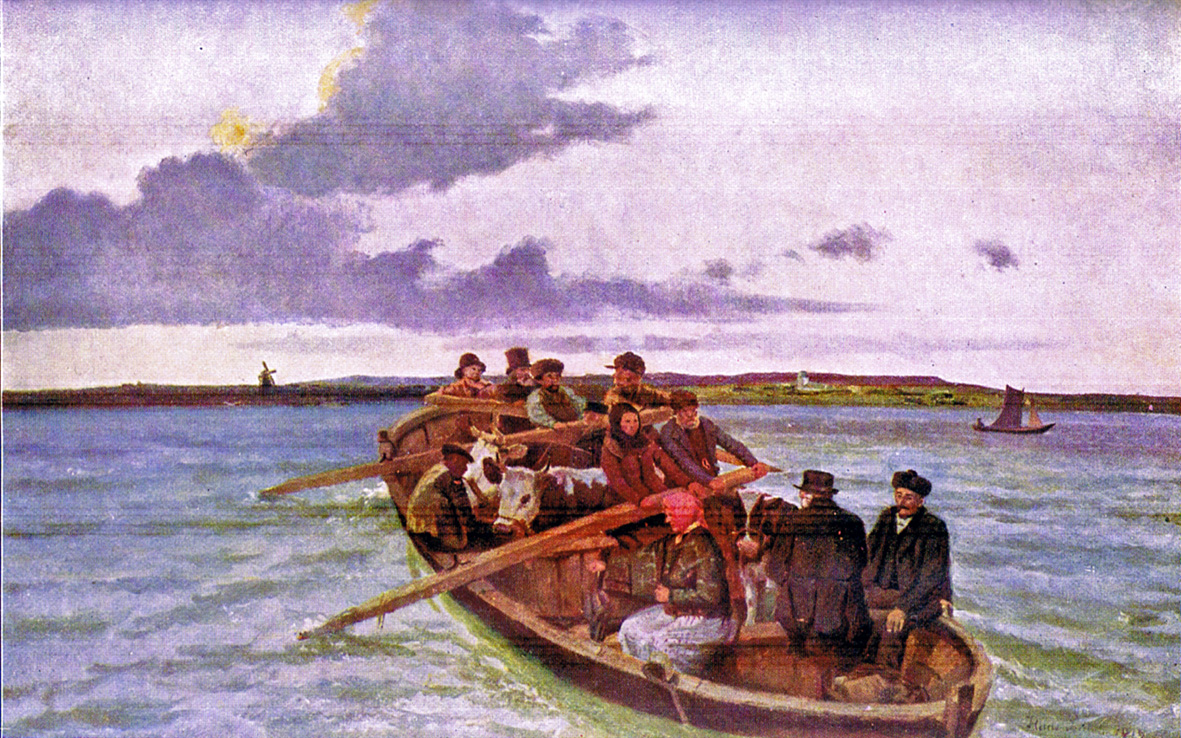 Færge over Sallingssund - Limfjorden. Maleri af Hans Smidth